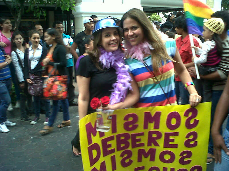 Marcha del orgullo LGBTI en la ciudad de Guayaquil, Ecuador, el 28 de junio de 2013.